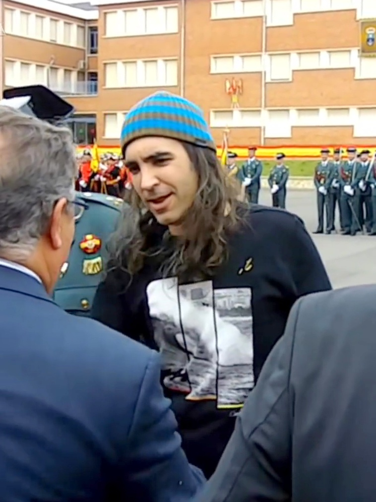 Chema Alonso recibe la medalla de la Guardia Civil con distintivo blanco (civil) de manos del ministro de Interior Juan Ignacio Zoido durante la conmemoración del 173º aniversario de la fundación de la Guardia Civil celebrada en el Colegio de Guardias Jóvenes "Duque de Ahumada" de Valdemoro